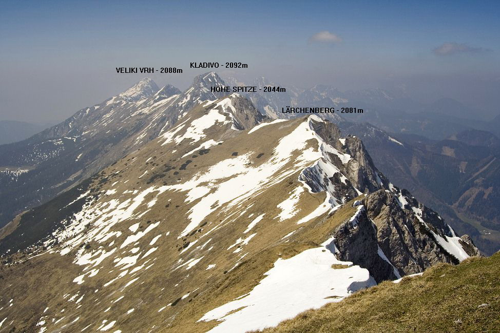 na hřebeni Koschuta (Košuty)